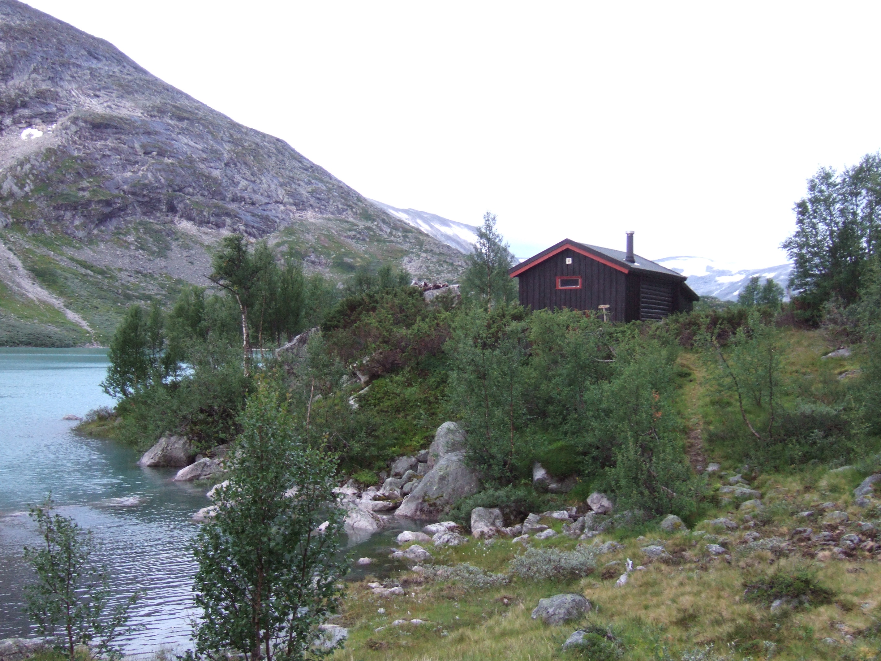 Skridulaupbu i Breheimen sommeren 2013. DNT turisthytte.